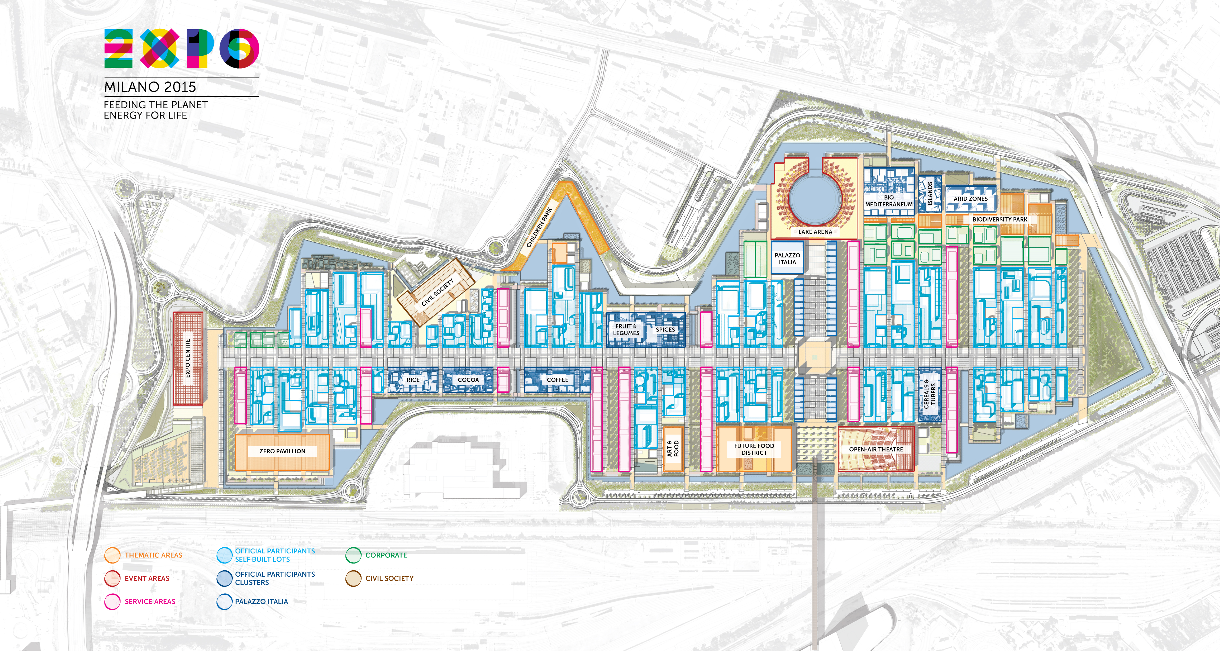 Planimetria EXPO 2015 Legenda Categoria:Immagini delle Expo Categoria:Expo 2015